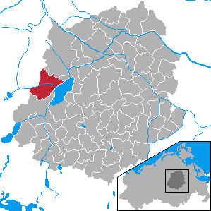 Neukalen, Landkreis Demmin, Mecklenburg-Vorpommern